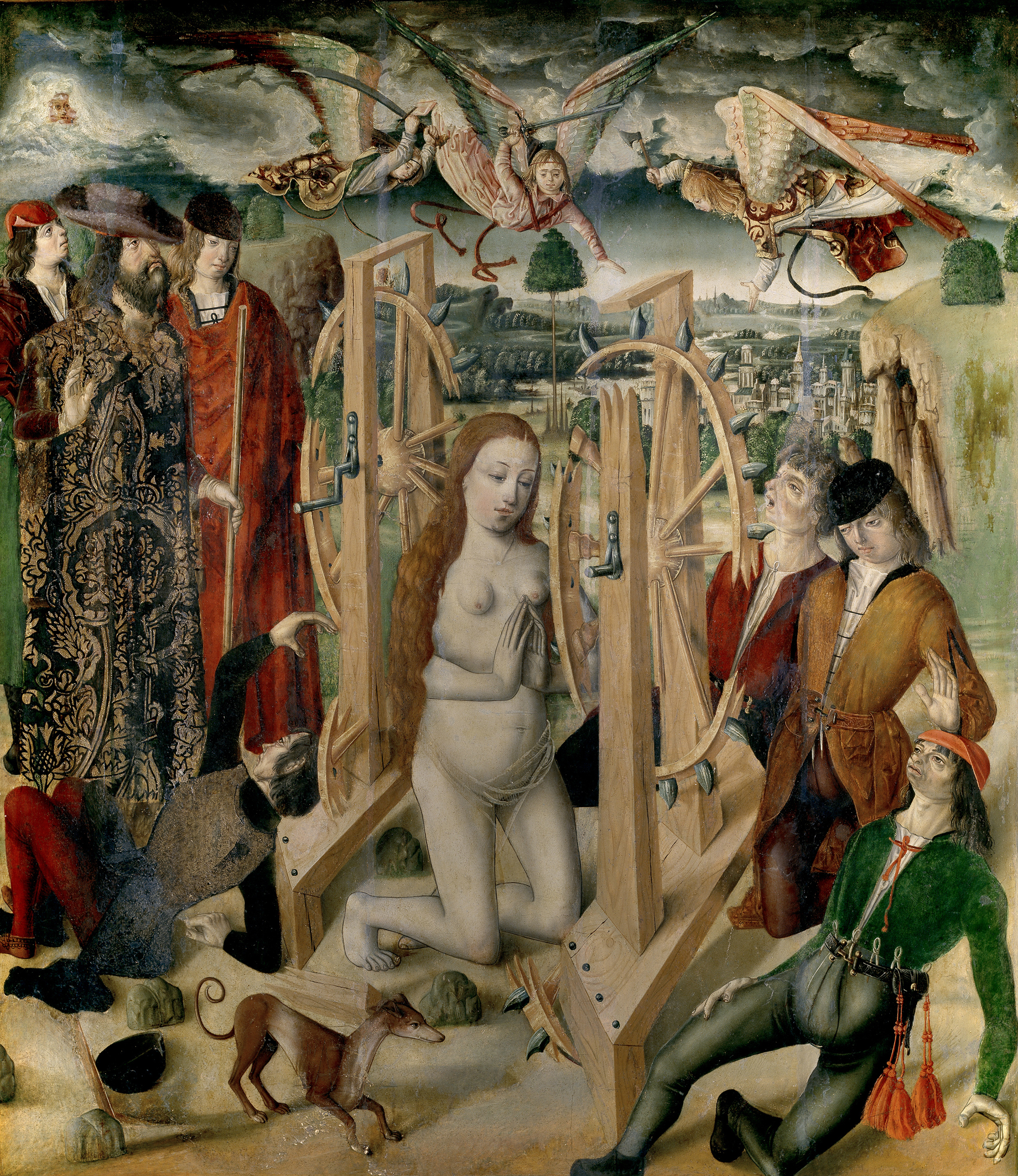 La obra representa el martirio de la virgen Santa Catalina de Alejandría, que murió por profesar el cristianismo, y la mártir aparece desnuda y arrodillada entre las dos ruedas dentadas que rompen tres ángeles. A la izquierda aparecen el juez y sus servidores, mientras que los cuatro verdugos se hallan heridos. Se aprecia una ciudad y, en la lejanía, más edificios. Obra de gran expresionismo, se ha pensado que pueda ser obra de Francisco Gallego, hermano de Fernando y colaborador habitual suyo (Texto extractado de Catálogo de las pinturas, Museo del Prado, Madrid, 1996. Pág. 120).